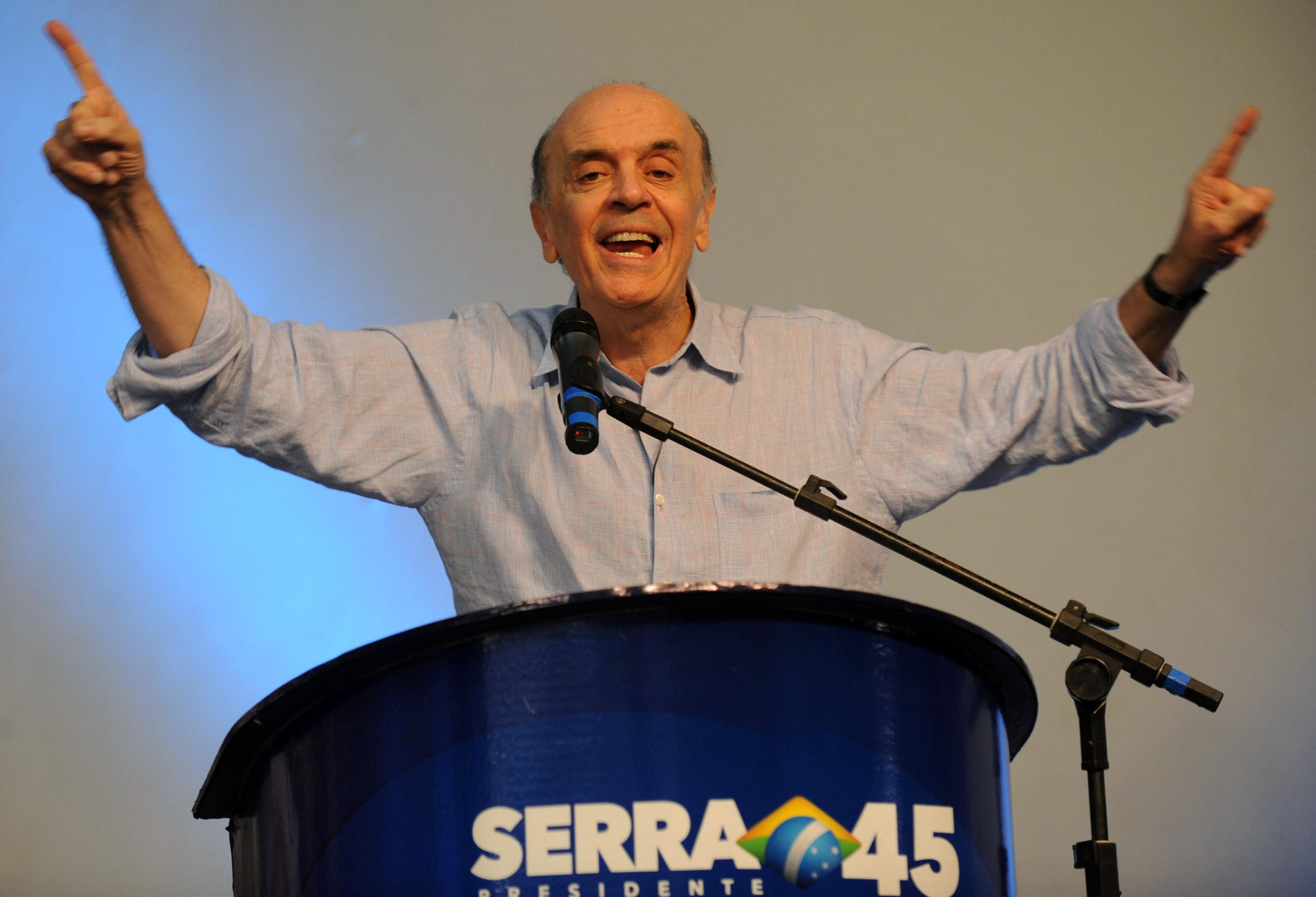 Curitiba - O candidato do PSDB, José Serra, começa oficialmente a campanha na capital do Paraná (Fabio Rodrigues Pozzebom/ABr)